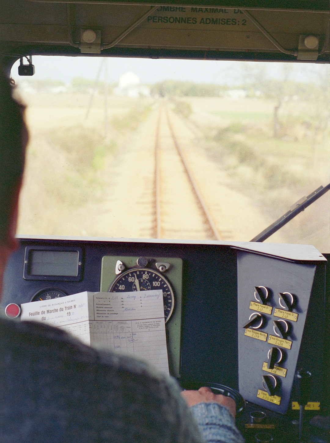 Dans le poste de conduite de l’autorail Verney X211 du chemin de fer du Blanc-Argent, entre Luçay-le Mâle et Valençay le 14 octobre 1989.